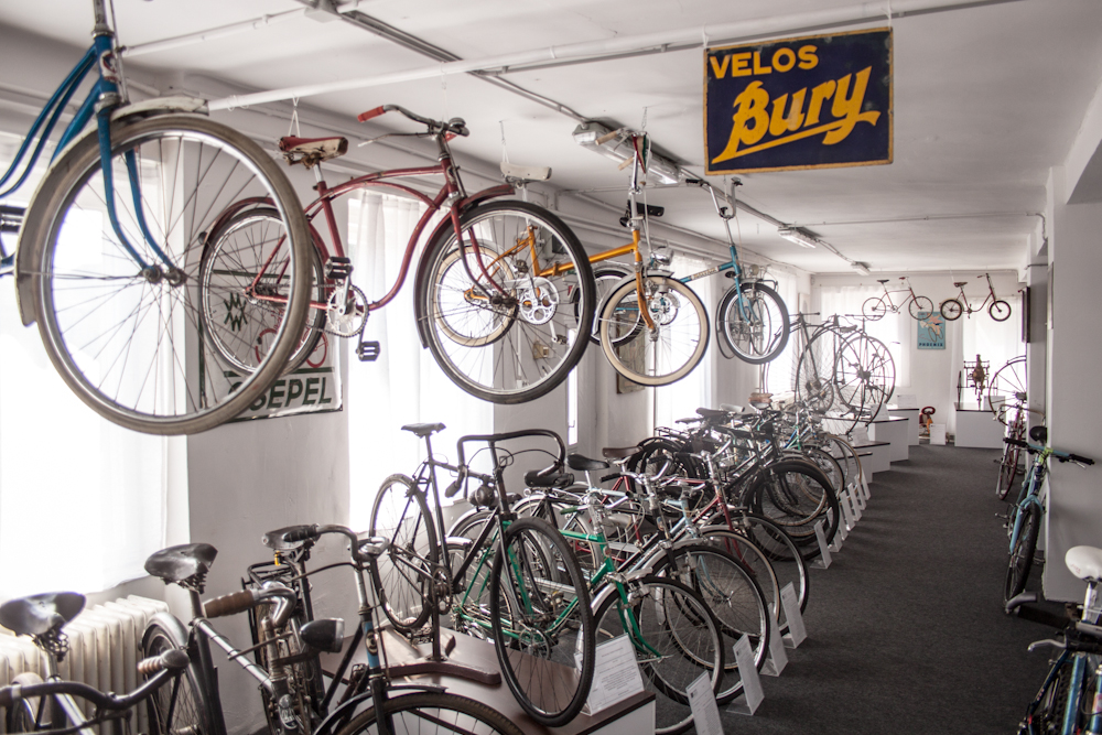 1. Bicycle Museum, detaillabel QS:Len,"1. Bicycle Museum, detail" label QS:Lhu,"Az 1. Kerékpár Múzeum részlete Balassagyarmaton"